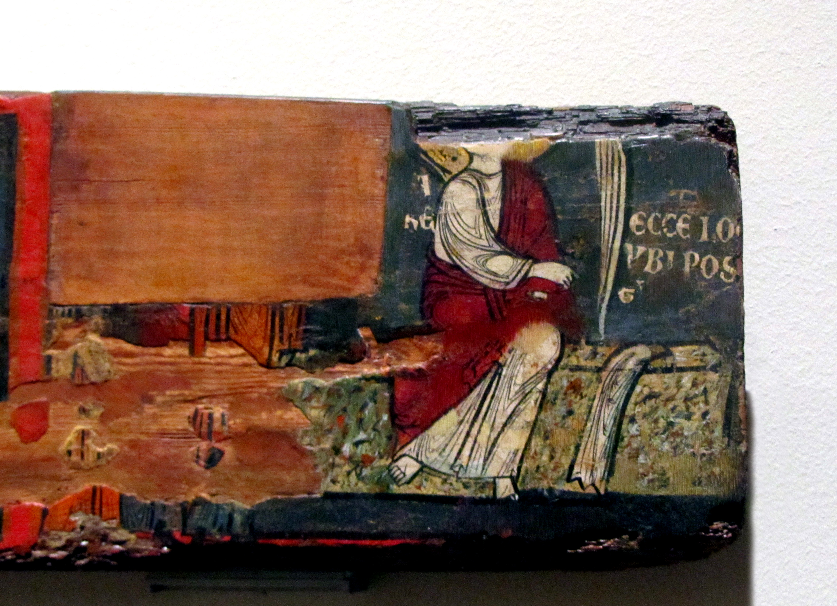 La Biga de la Passió és una peça de la col·lecció permanent del Museu Nacional d'Art de Catalunya de la que no se sap el seu lloc de procedència. Podria haver format part d'un baldaquí (com les que subjectaven la taula del Baldaquí de Tost) o hauria pogut ser una biga travessera (com la de l'absis de Toses). Conté sis episodis de la Passió de Crist i la visita de les Maries al Sepulcre que al·ludeix a la Resurrecció. Un dels més destacats és el del Plany sobre el Crist difunt, gran exemple de la influència bizantina que caracteritza una part de l'art del 1200. La factura molt minuciosa i detallista assenyala que és obra d'un miniaturista, estretament relacionat amb la il·lustració del Liber Feudorum Maior (Arxiu de la Corona d'Aragó) i amb algun exemple de miniatura castellana.